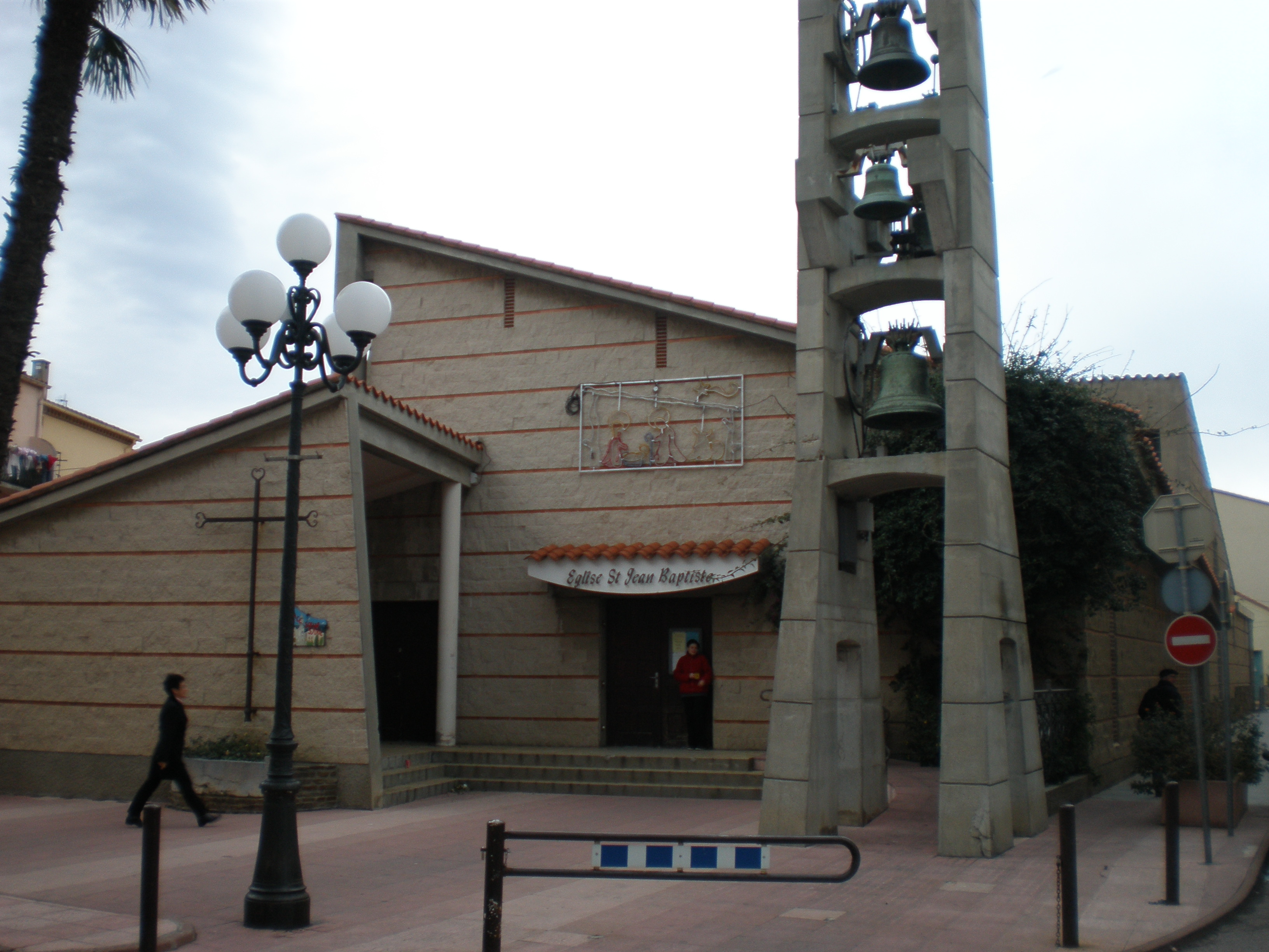 Église Saint-Jean-Baptiste de Banyuls-sur-Mer (Pyrénées-Orientales, France)